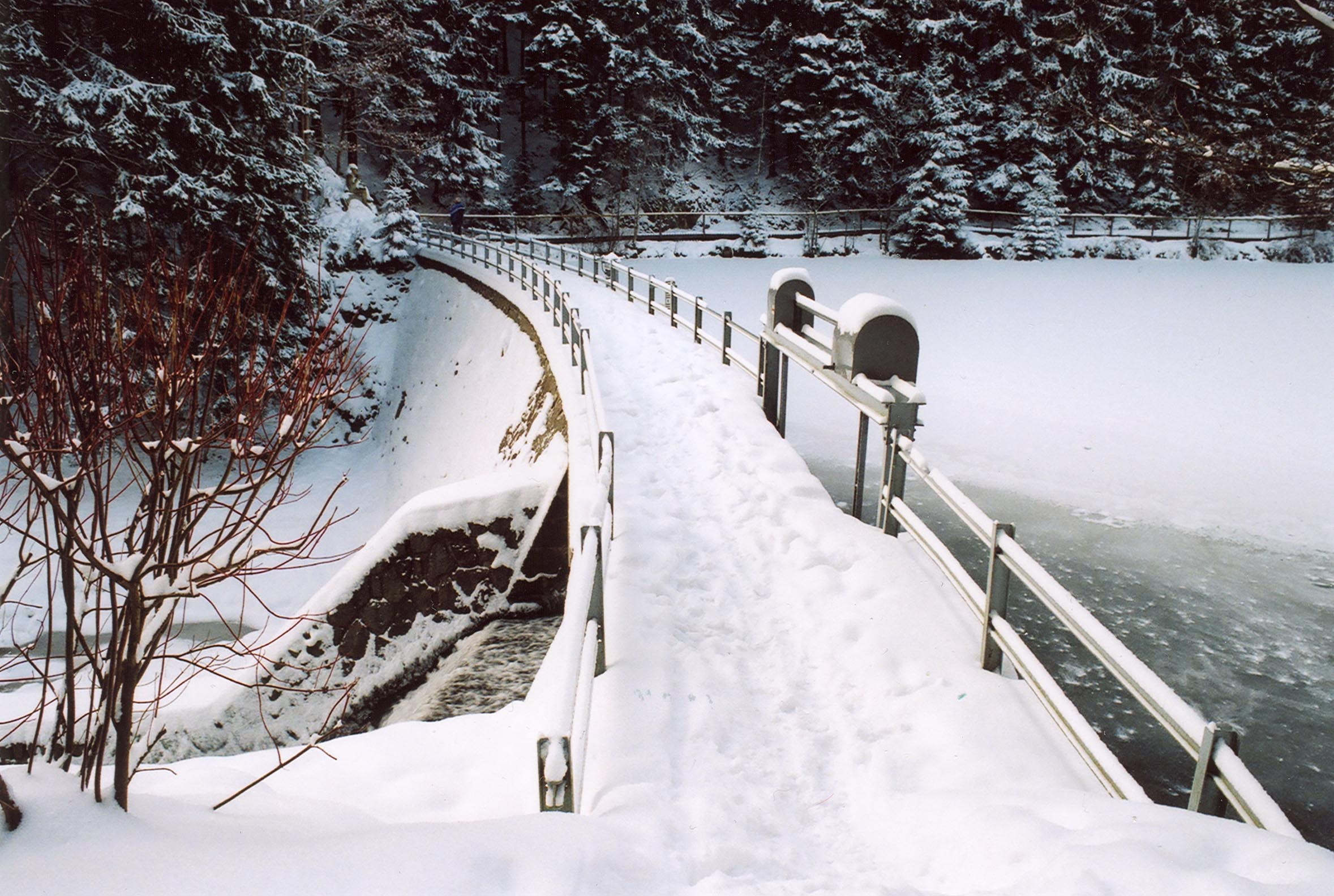 Ivanské jezero - hráz